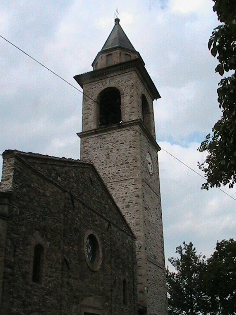 Bazzano (Neviano degli Arduini) - Pieve romanica di Sant'Ambrogio